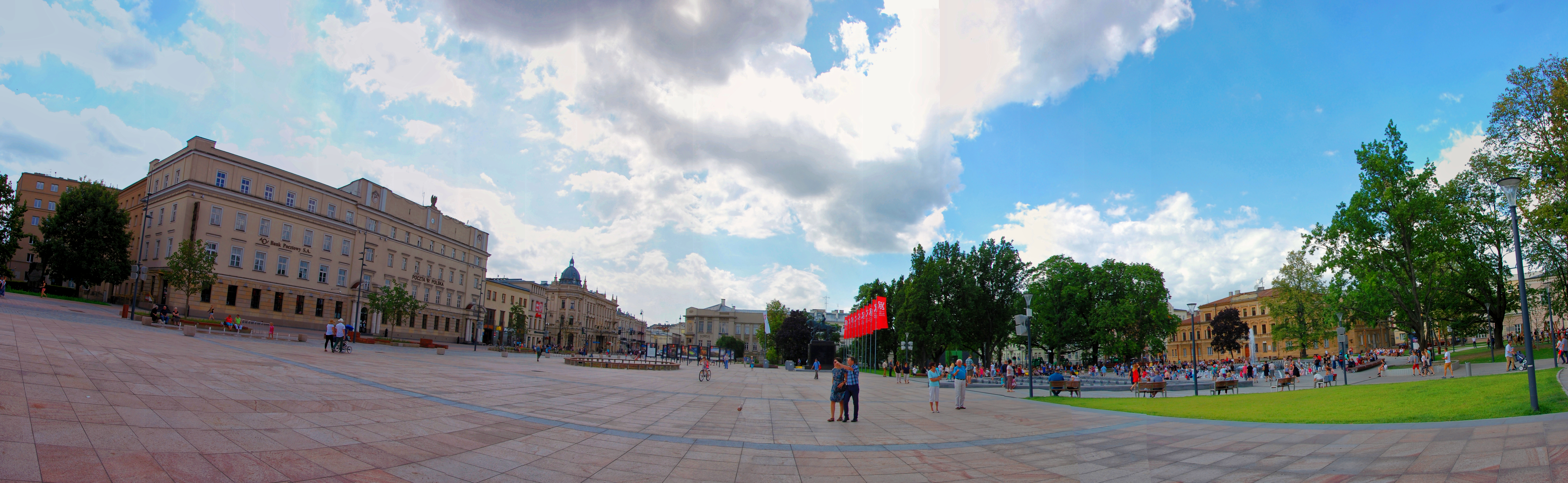 Plac Litewski w Lublinie